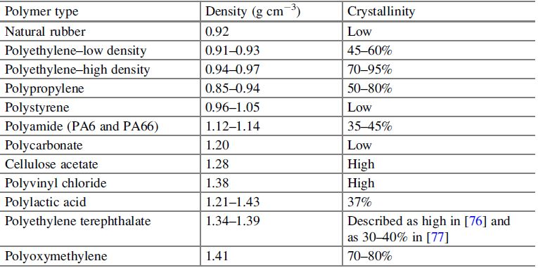 ارتباط بین چگالی و بلورینگی